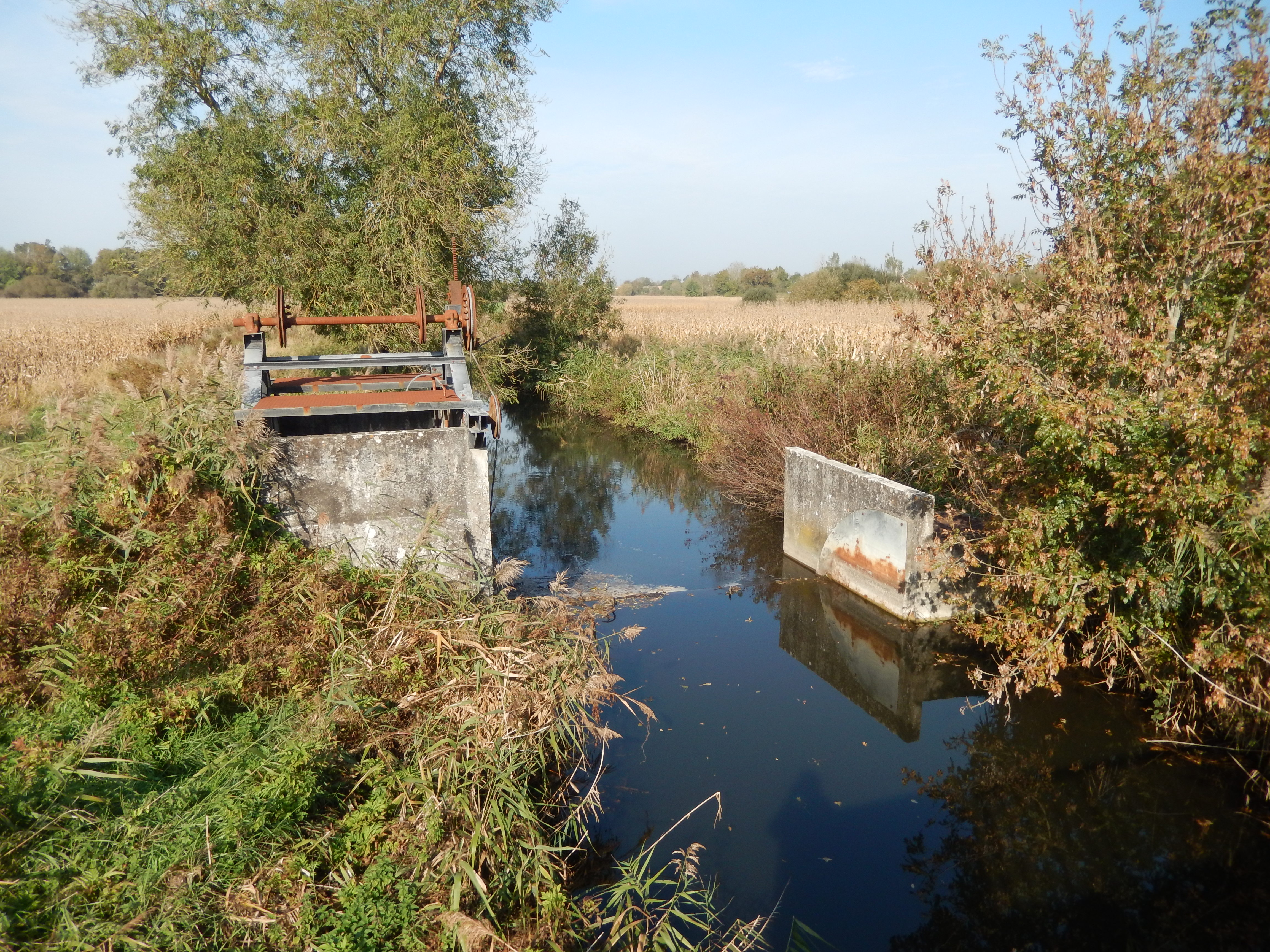 L'Arnoult, rivière de Charente-Maritime et affluent du fleuve Charente, sert de ligne de démarcation entre les communes de La Clisse (au nord, et à droite sur l'image) et de Luchat (au sud, et à gauche sur l'image).